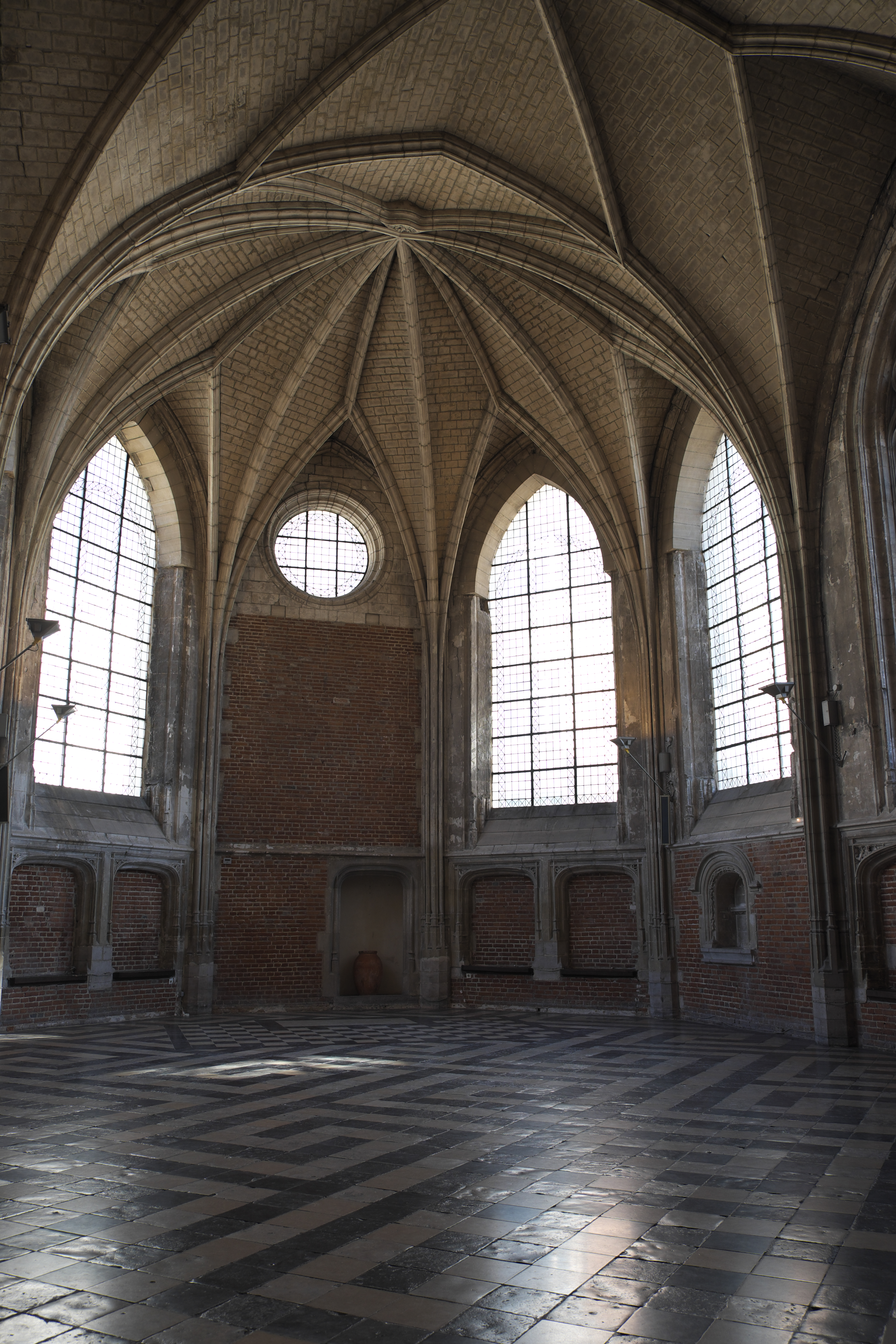 Palais Rihour in Lille im Département Nord (Nord-Pas-de-Calais/Frankreich)